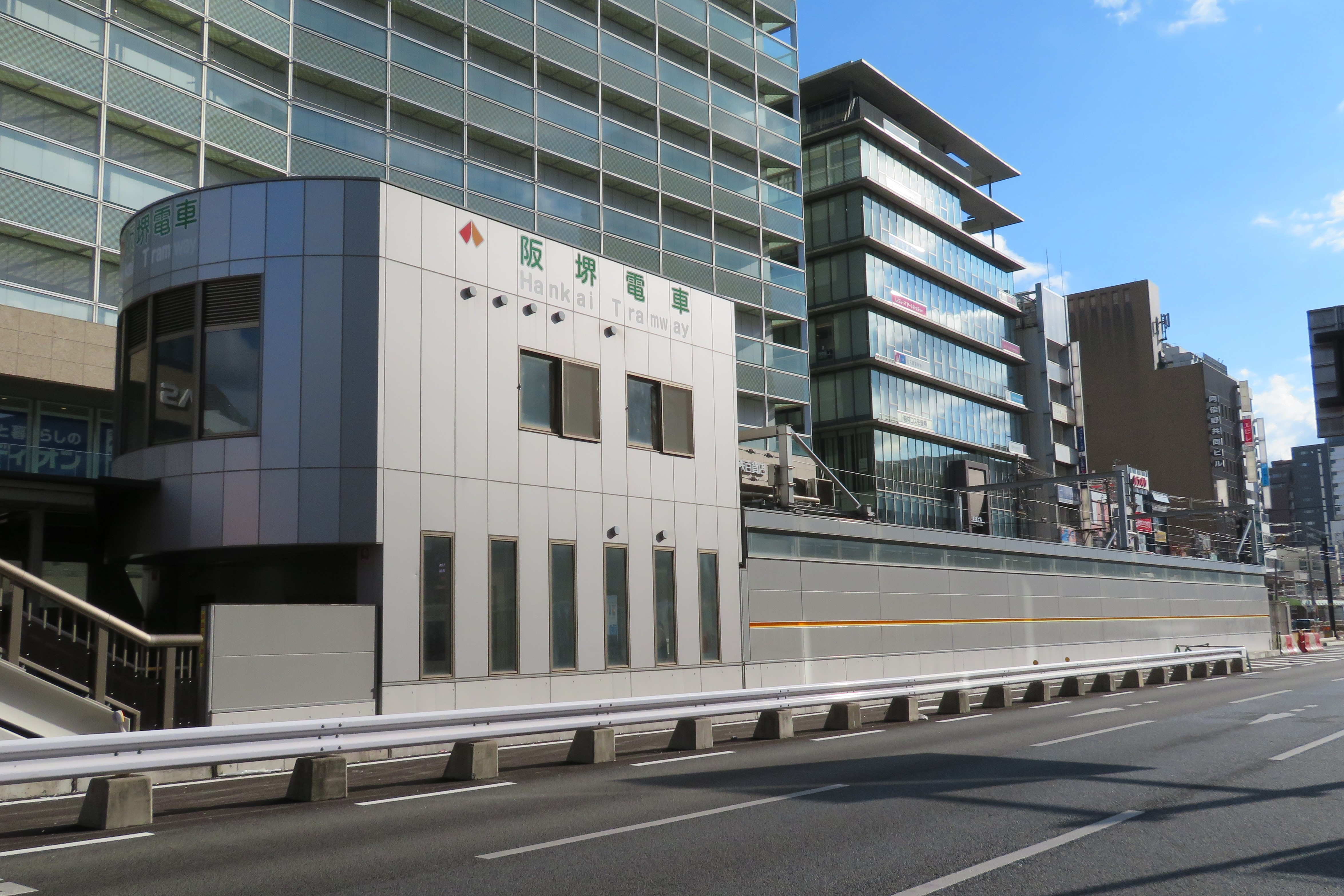 阪堺天王寺駅前停留場